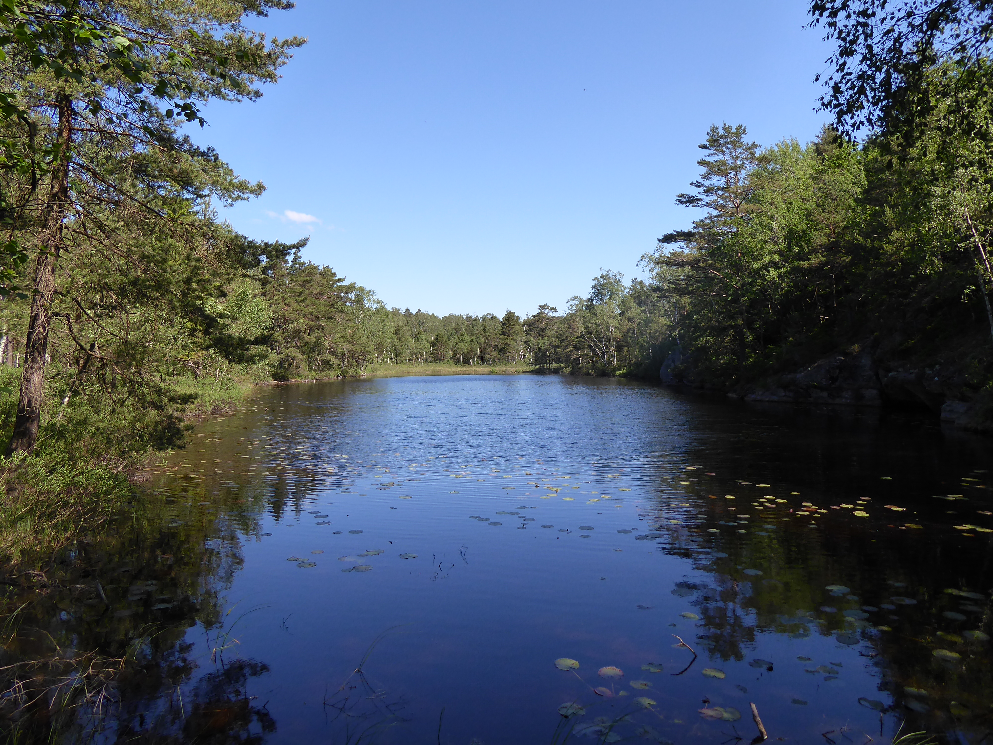 Den svåråtkomliga Bergåstjärnen (Västra Götaland, Sverige) fotad från sydänden den 14 juni 2020.